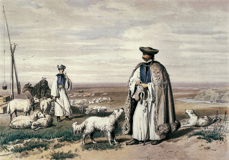 A juhász, színes kőrajz